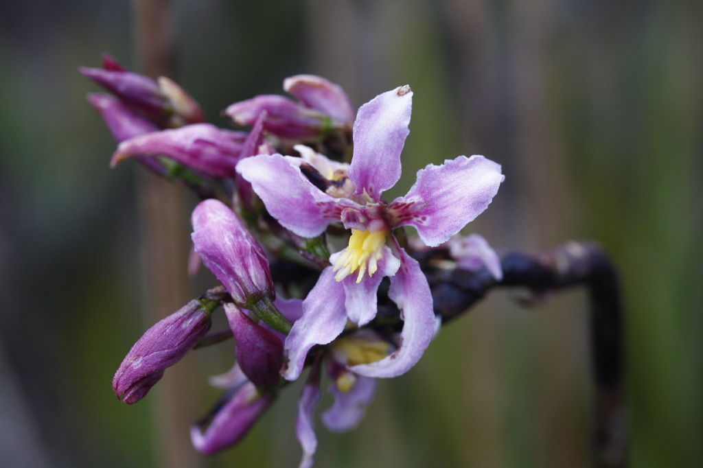 Cyrtochilum ramosissimum (in situ)